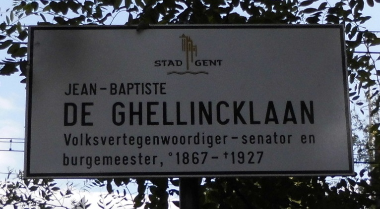 Straatnaam - Sint-Denijs-Westrem - Gent - Oost-Vlaanderen - België